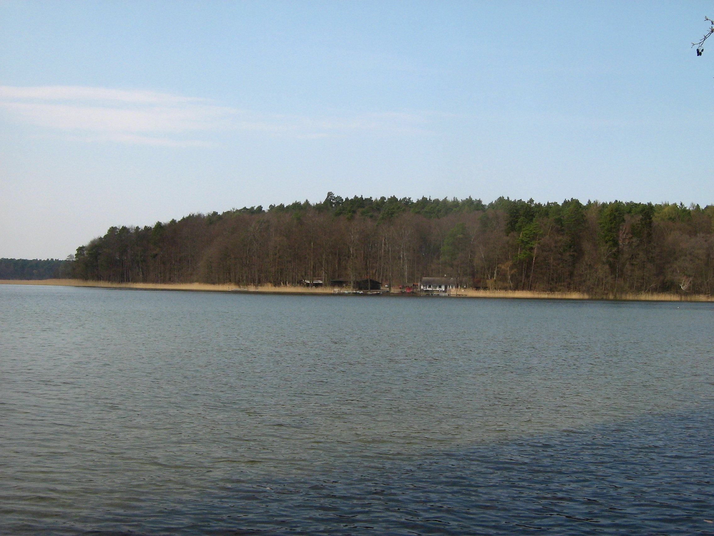 Der Große Stechlinsee bei Neuglobsow (Gemeinde Stechlin, Brandenburg). Blick auf die Fischerei in Neuglobsow.